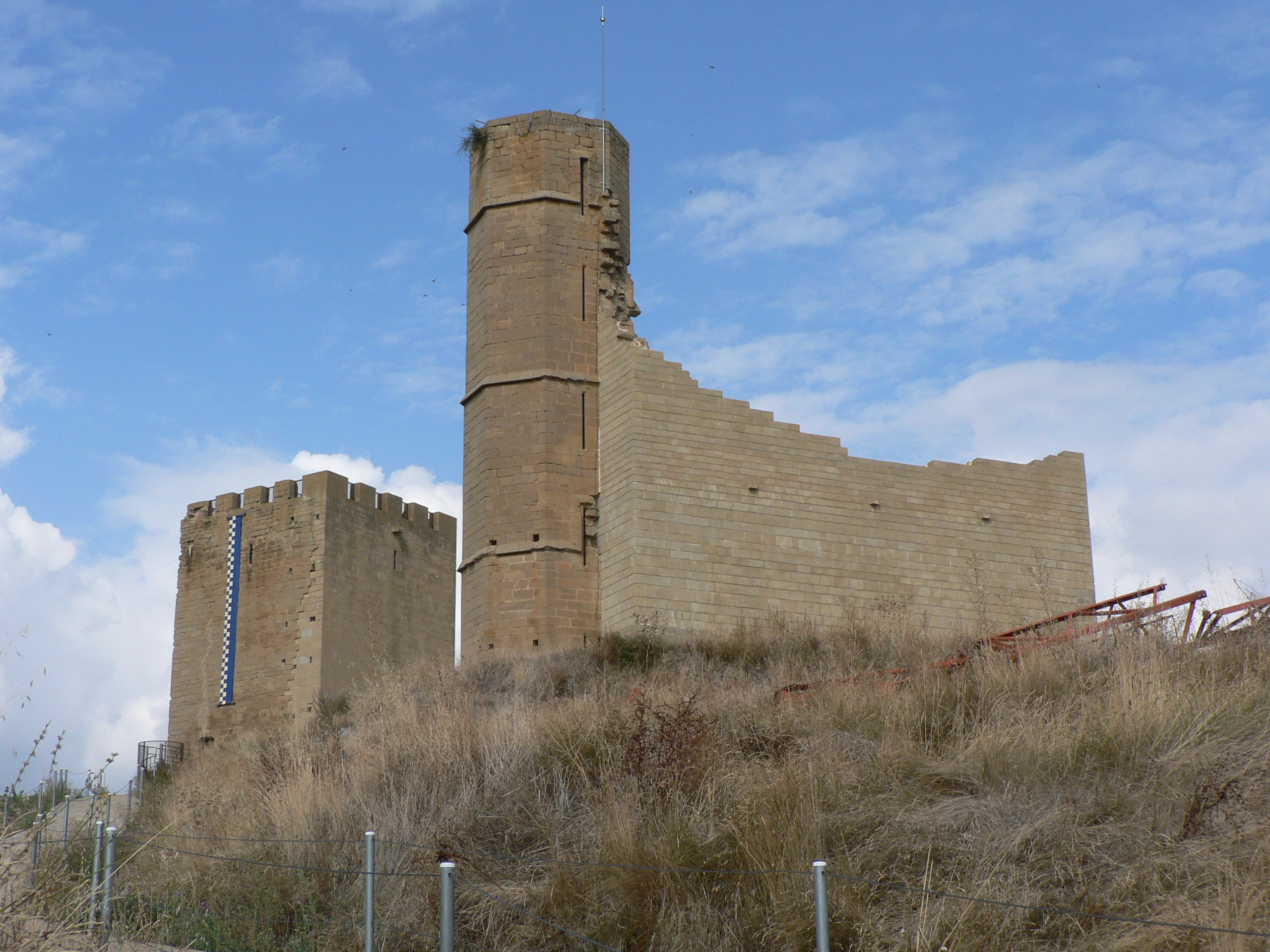 Castiello d'Uncastiello (Zinco Billas, Aragón)